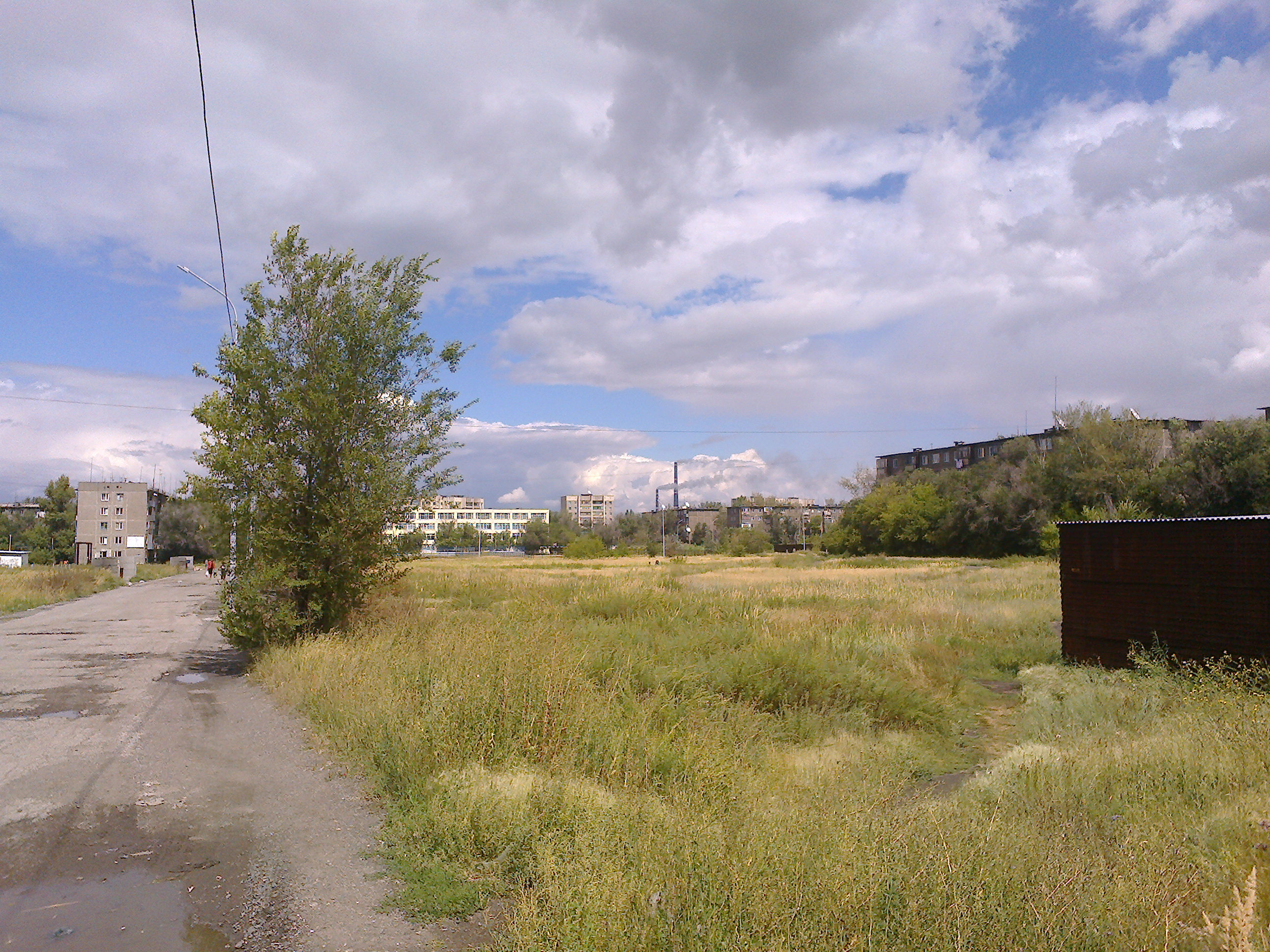 Карагандинская ТЭЦ-3. Вид со стороны автостоянки у 14-го микрорайона Майкудука